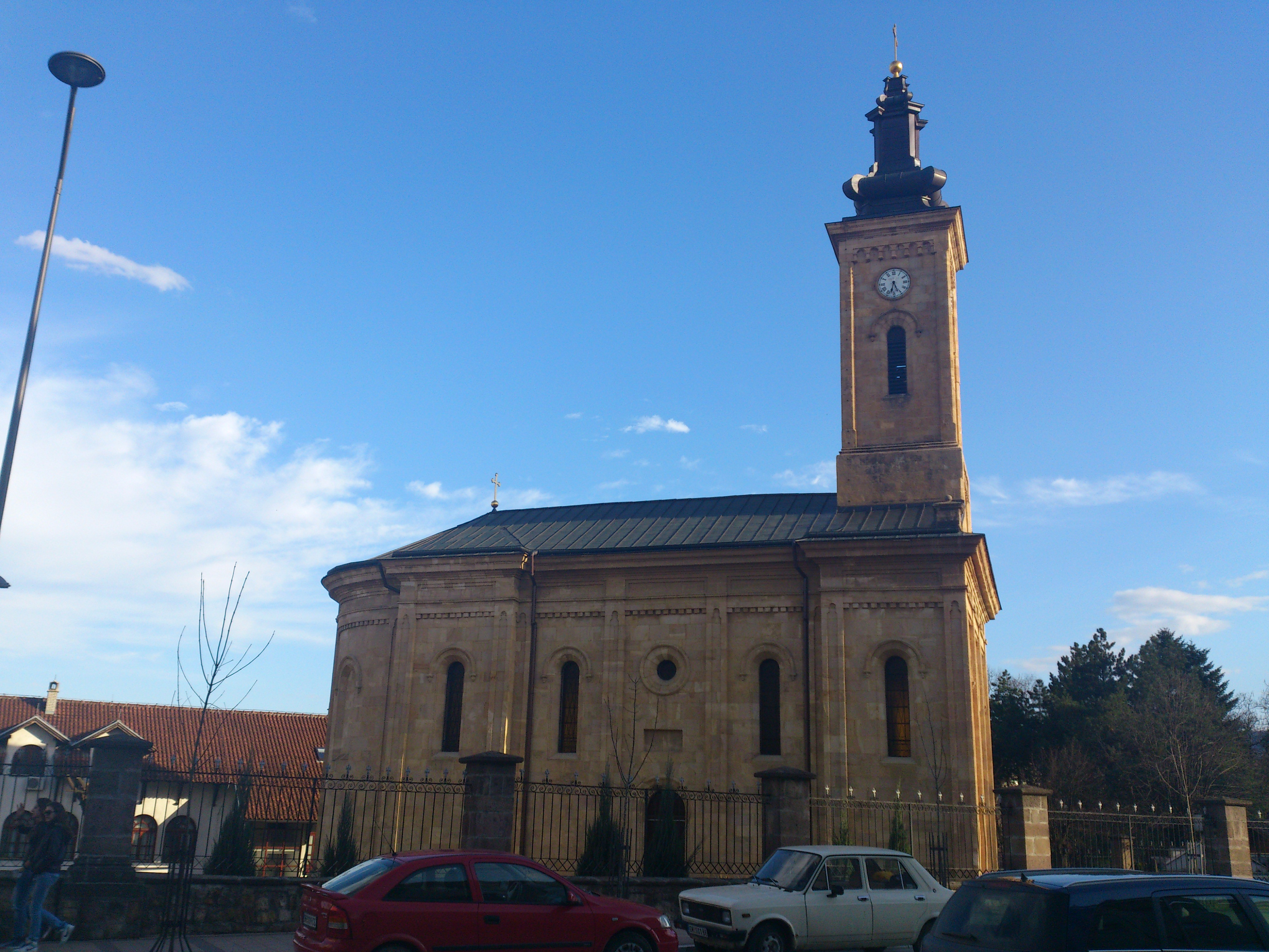 Црква је изграђена у 19. веку.